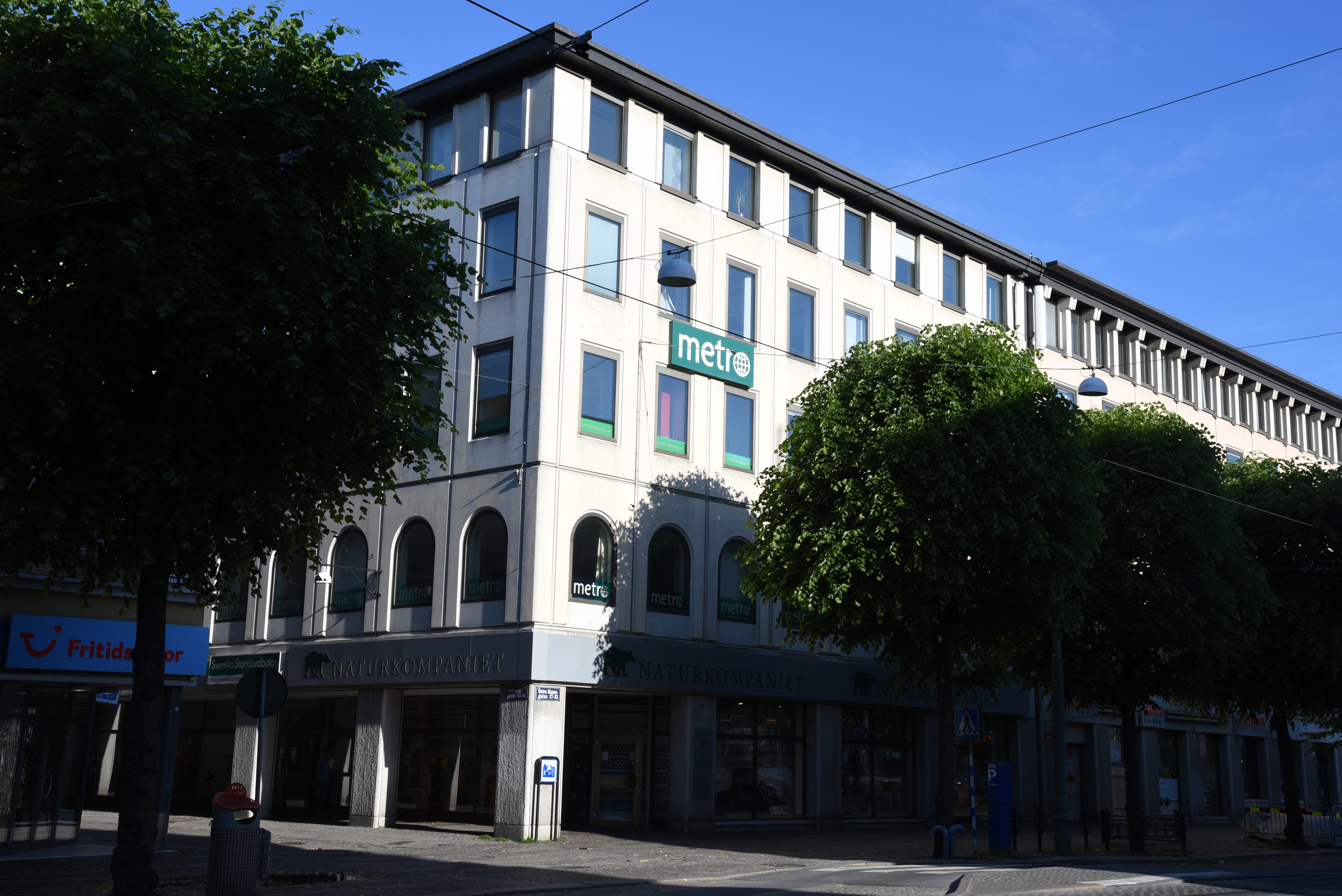 Handelsbankens hus Östra Hamngatan 27 - Drottninggatan 36 i Göteborg år 2015.